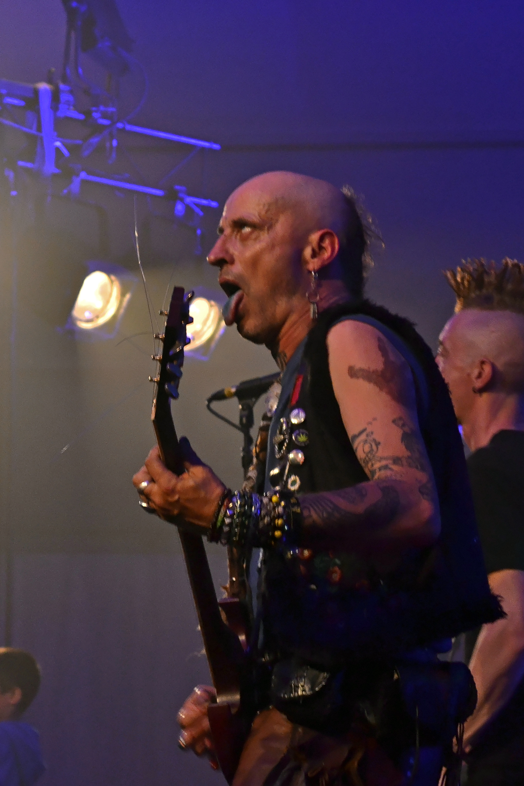 Le groupe punk breton Les Ramoneurs de Menhirs lors du Cyber fest-noz organisé en clôture de la 60e Fête des brodeuses de Pont-l'Abbé.